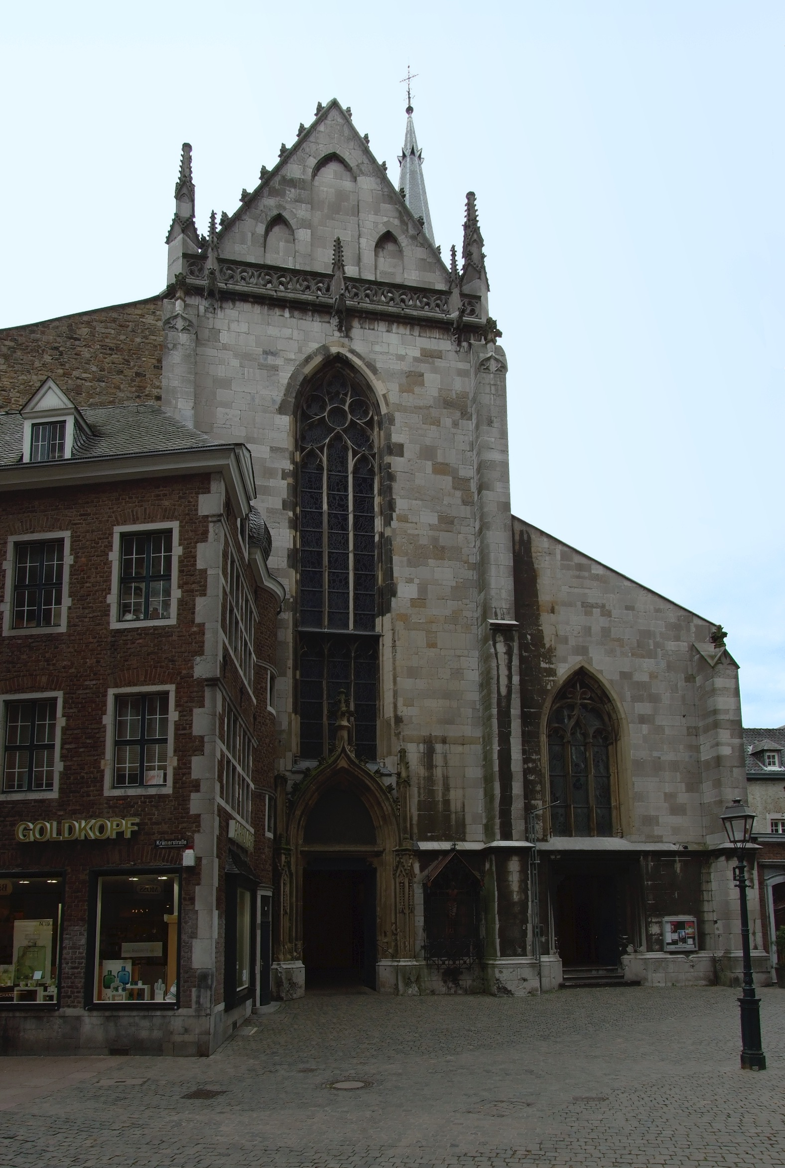 St. Foillan in Aachen